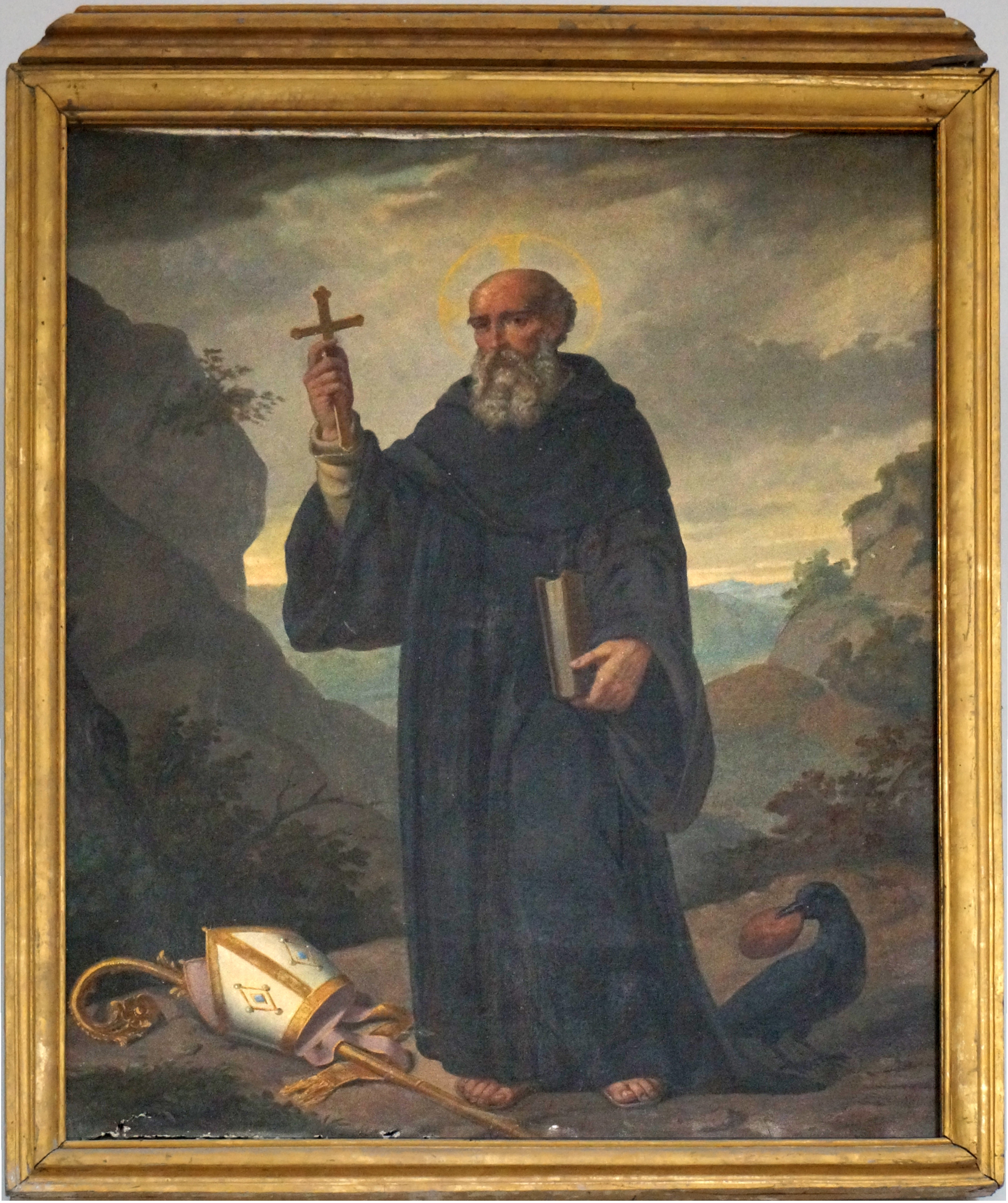 tableau en l'église de Verzy.